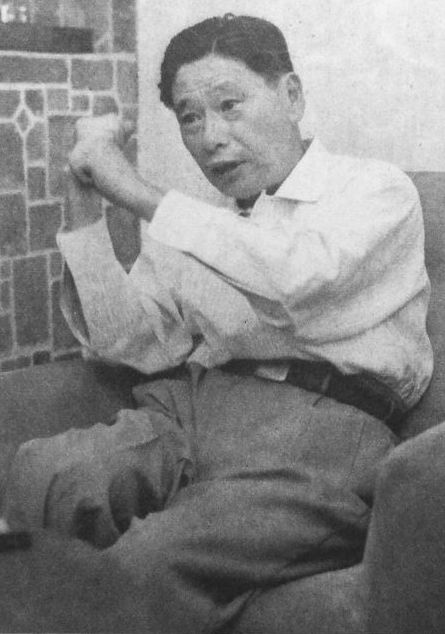 大西禎夫（高松琴平電気鉄道社長）